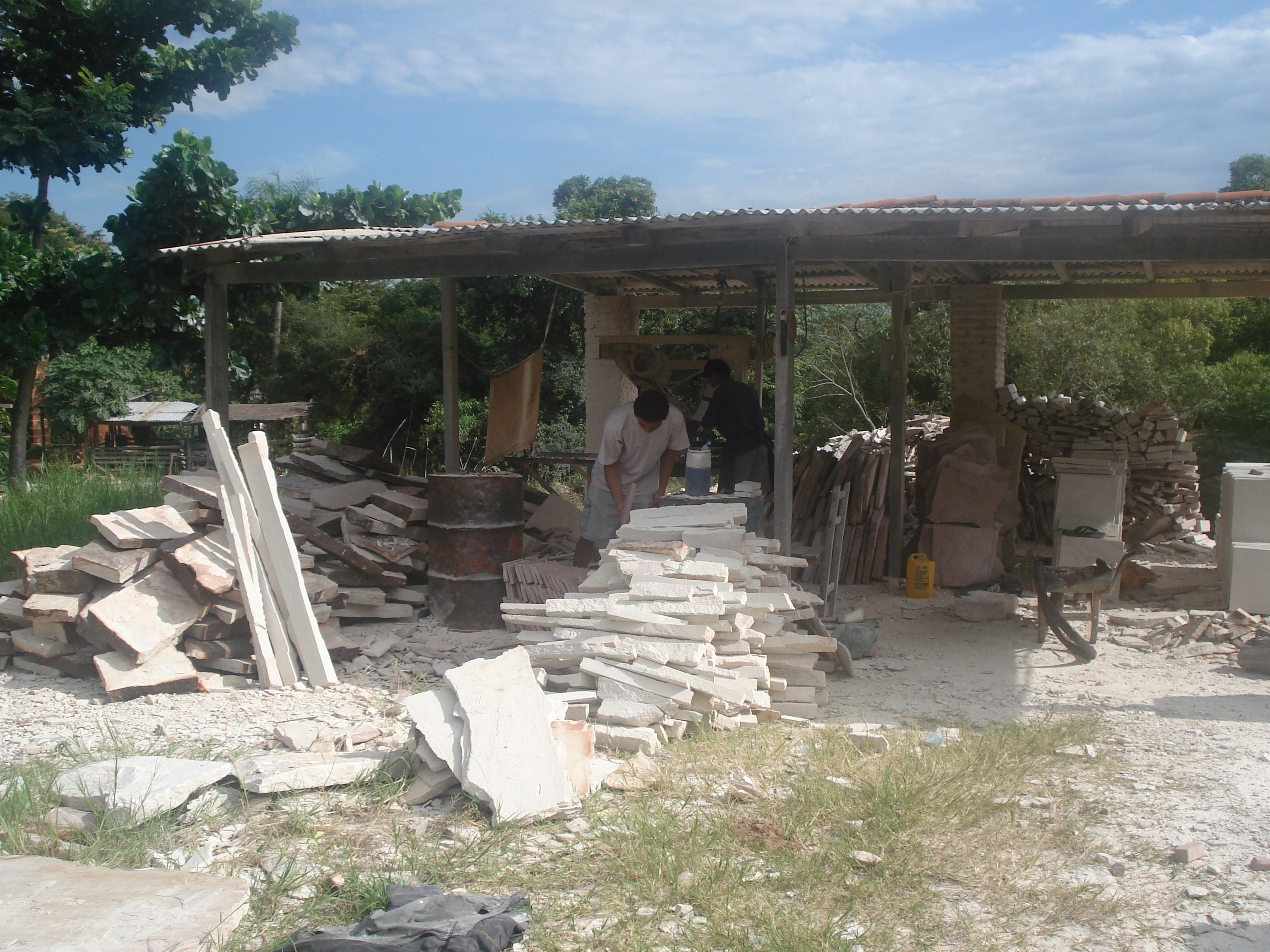 Emboscada. Trabajo en piedra